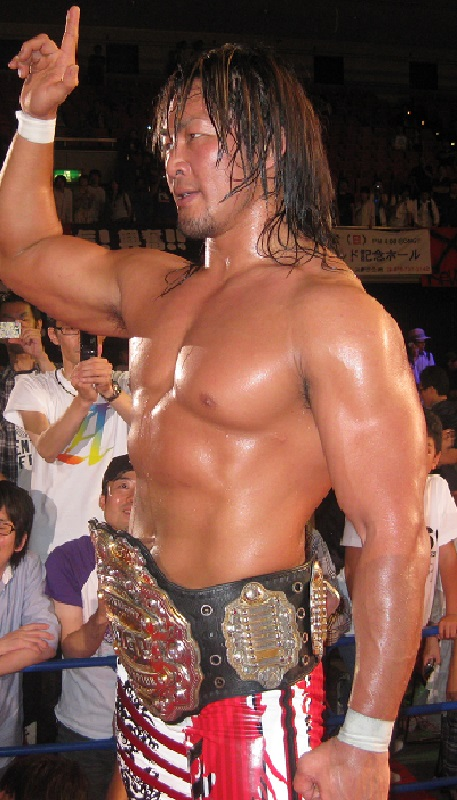 2012年6月16日 新日本プロレス 大阪府立体育会館大会 IWGPヘビー級選手権試合後